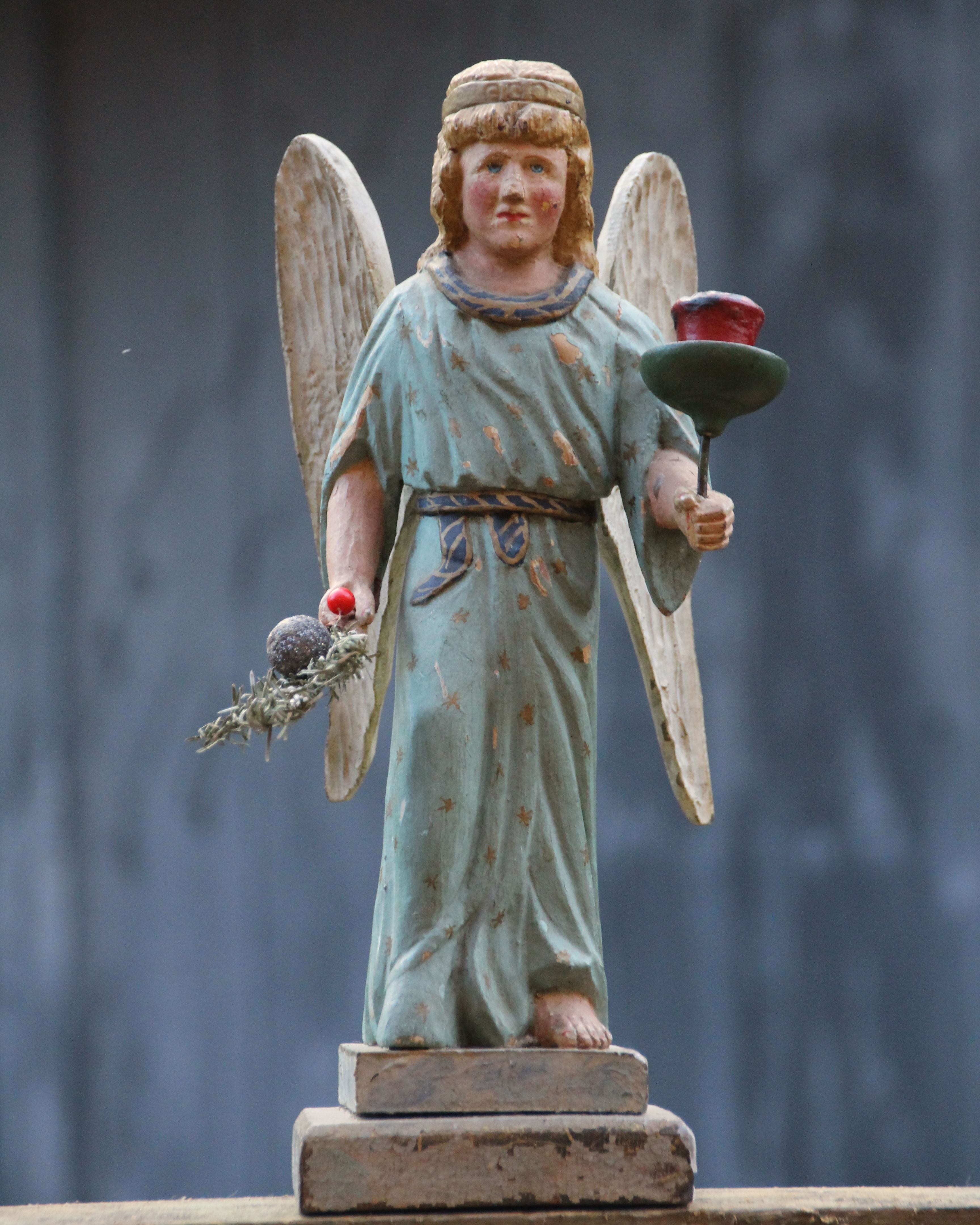 Lichterengel: „Beinengel“ werden im Erzgebirge (dort in Erzgebirgisch Baaengel) die lichtertragenden Engel genannt, bei denen der Rock nicht bis zum Sockel reicht, auf dem sie stehen, sondern die Füße und ein Teil des Beins zu sehen sind. Die Herstellung bei gedrechselten Figuren ist aufwändiger, da nicht der ganze Rumpf durch Holzdrechseln hergestellt werden kann, sondern der untere Teil des Körpers geschnitzt werden muss. Hier geschnitzte Engelfiguren, die zu datieren sind auf die Zeitspanne von Anfang bis Mitte des 20. Jahrhunderts, möglicherweise entstanden sie schon ausgangs des 19. Jahrhunderts. Sie gehören zur Sammlung DS.